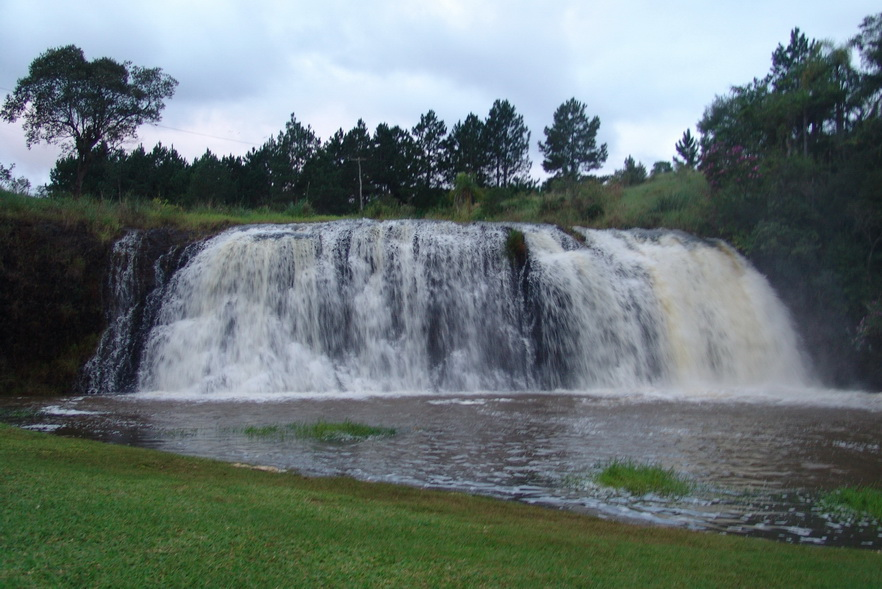 Imagem da Cachoeira Véu de Noiva, município de Botucatu, estado de São Paulo, Brasil.